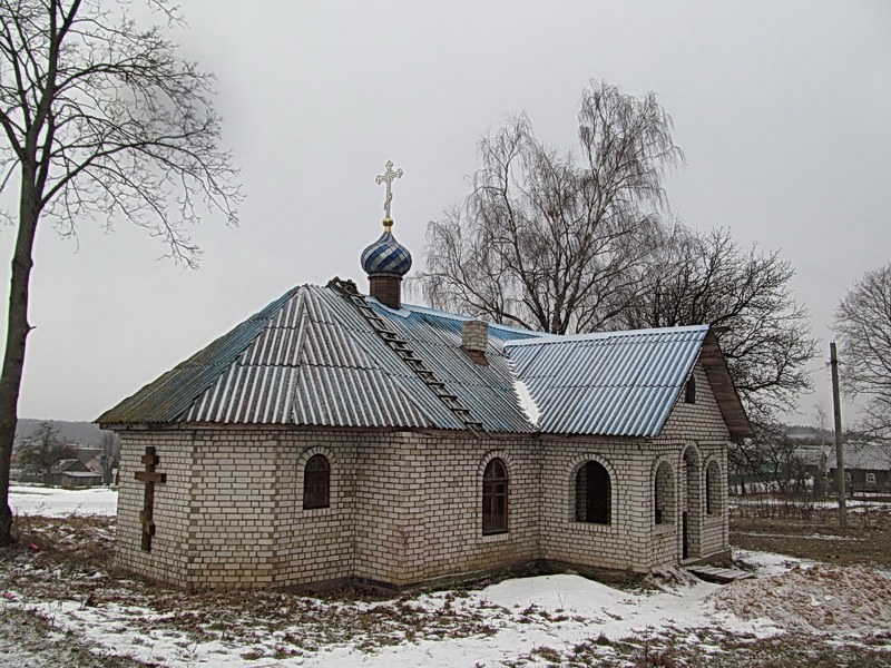 Корань. Царква